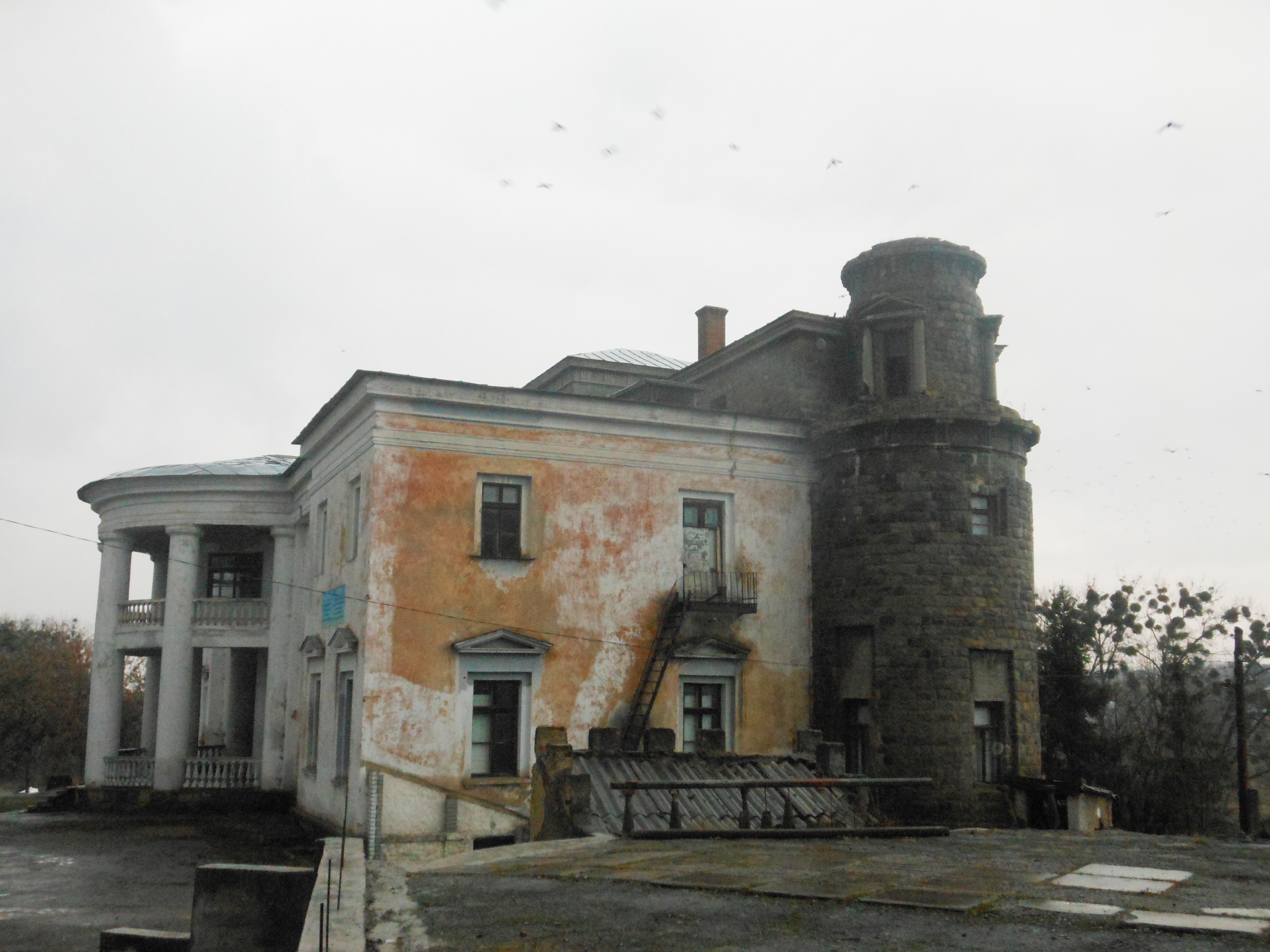 Палац, Хмільник, вул. Шевченка, 1